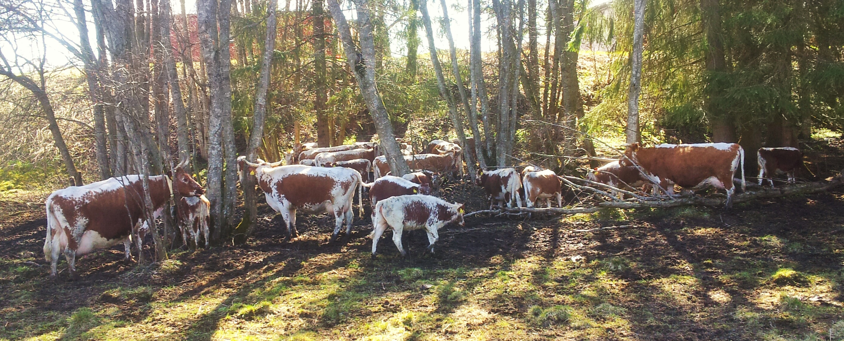 Telemarksfe. Bildet tatt ved Ilseng i Hedmark.